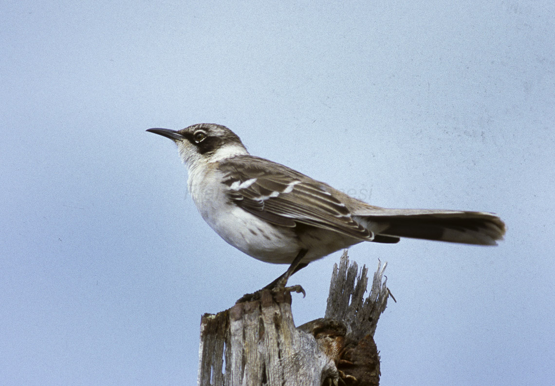 Galapagos mockingbird (Mimus parvulus) - Galapagos 86 0037